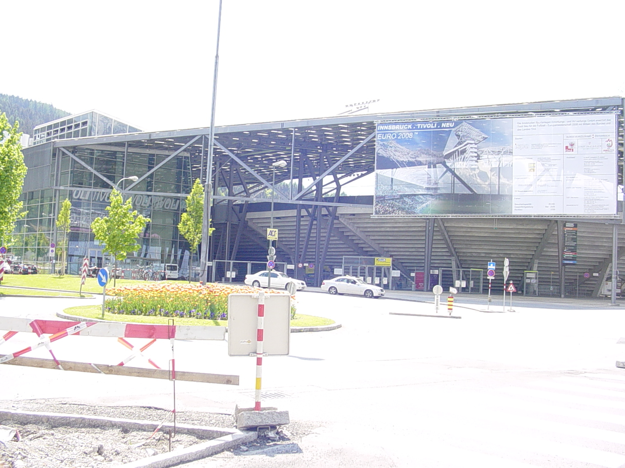 Foto des "Tivoli Neu" während des Umbau im Mai 2006.